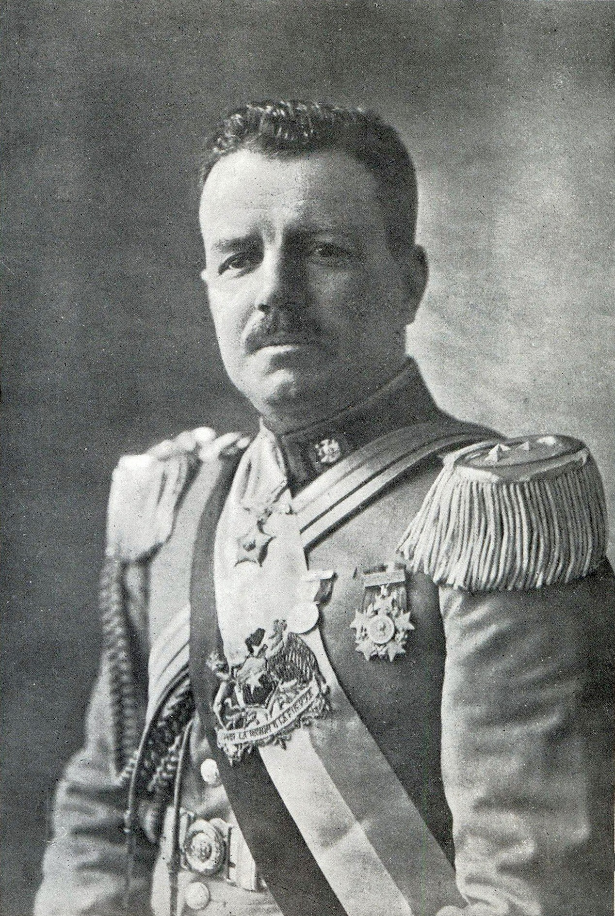 General Carlos Ibáñez del Campo en su primera presidencia.